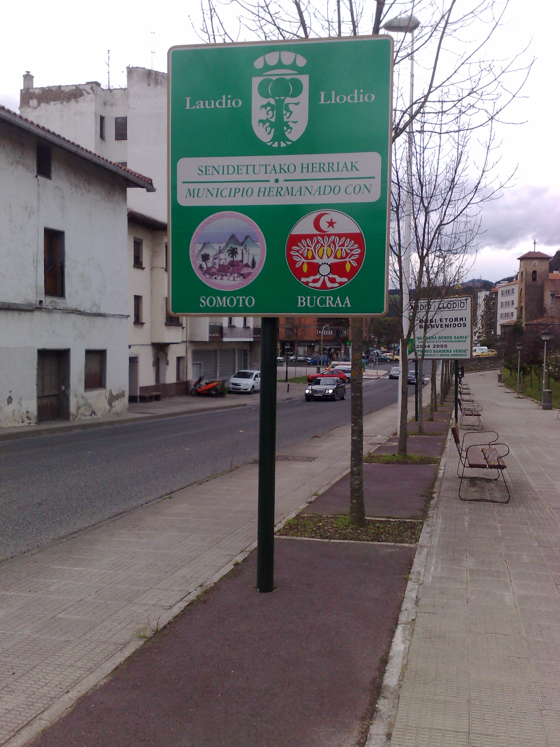 Mendebaldeko Saharako Bu Kraako armarria Euskal Herriko Laudioko sarreran. Senidetutako herriak dira.